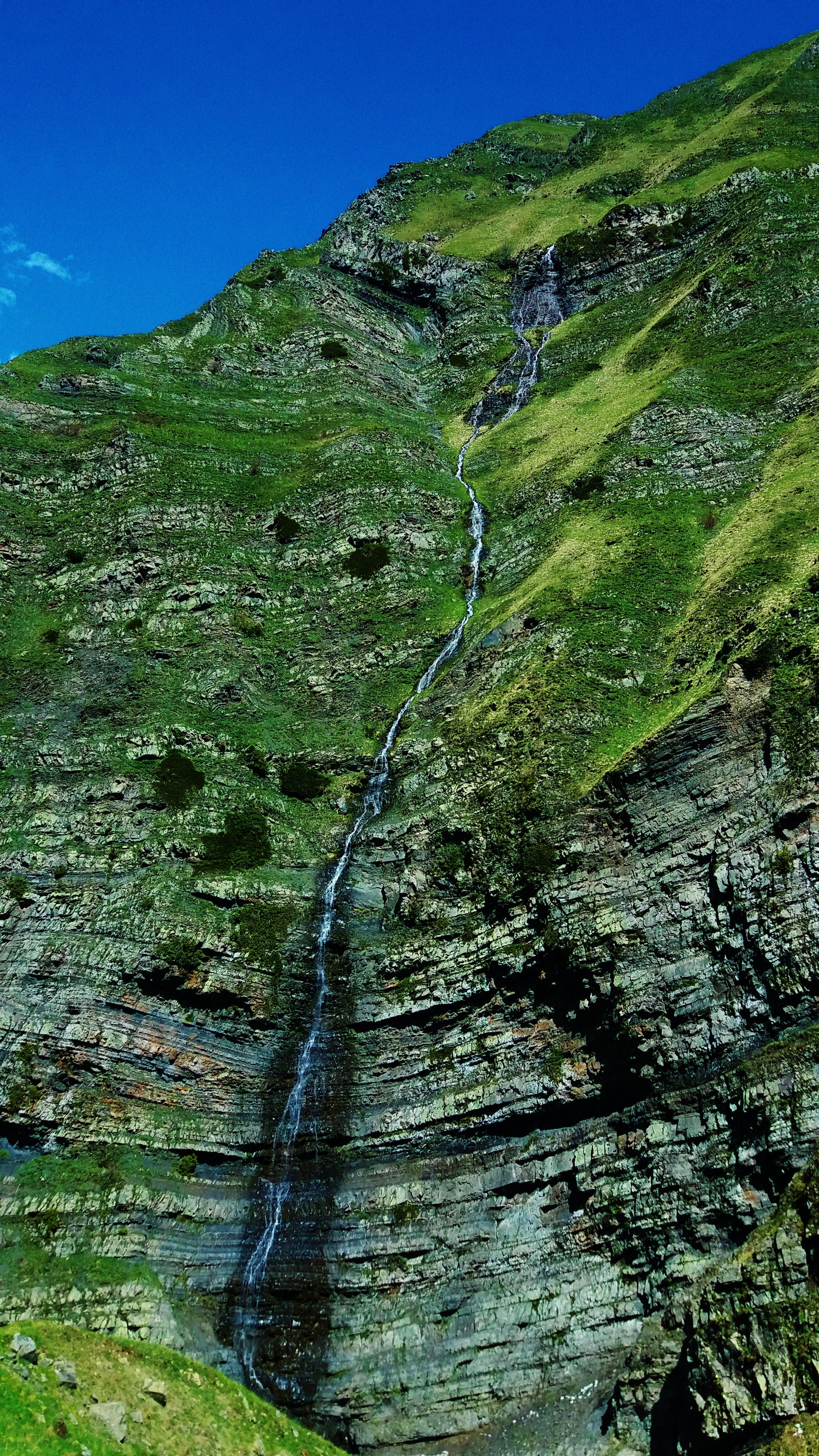 İlisu Dövlət Qoruğu. Suqovuşan